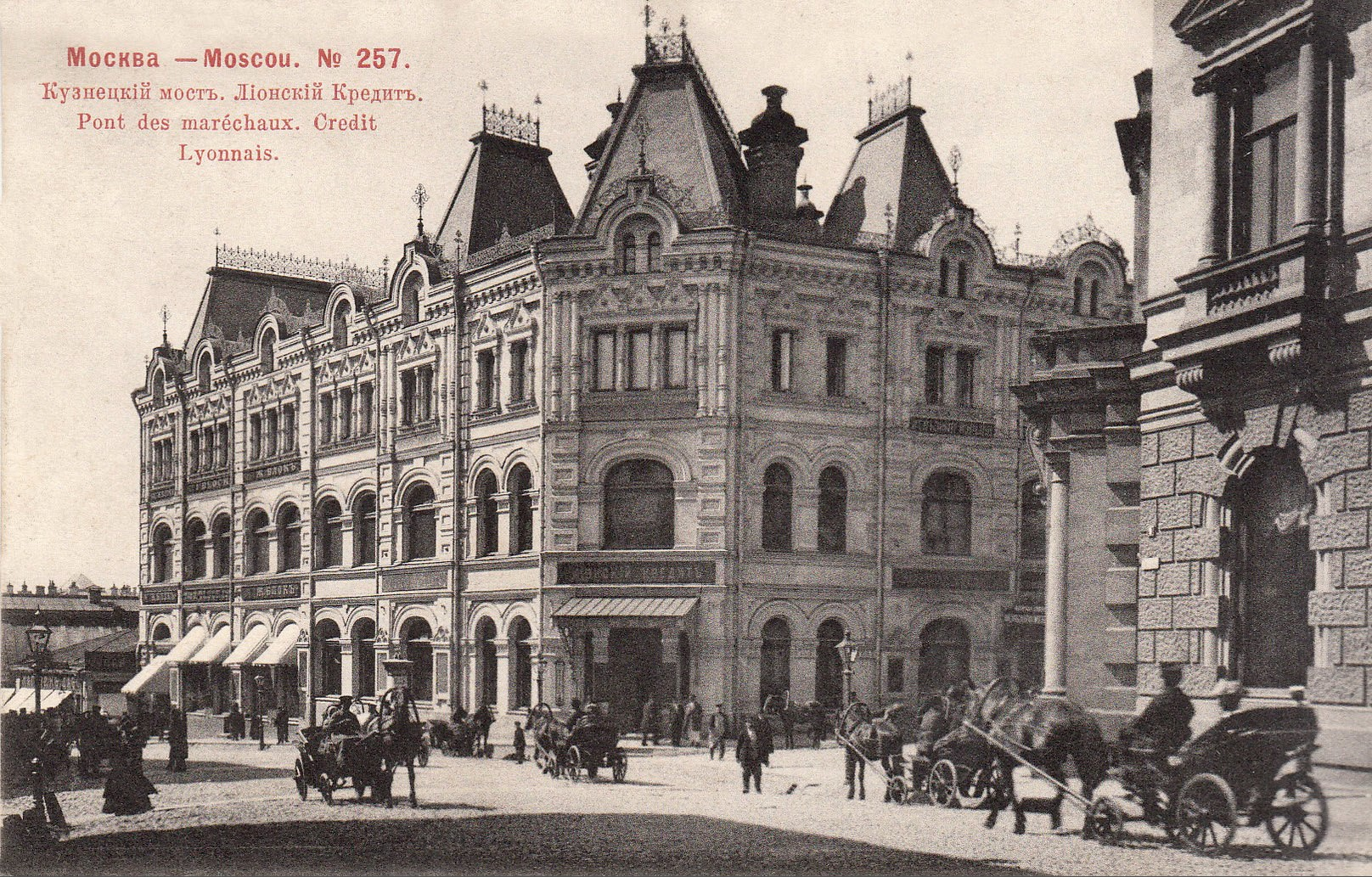 Доходный дом П. М. и С. М. Третьяковых (Банк «Лионский кредит») (№ 13/9)